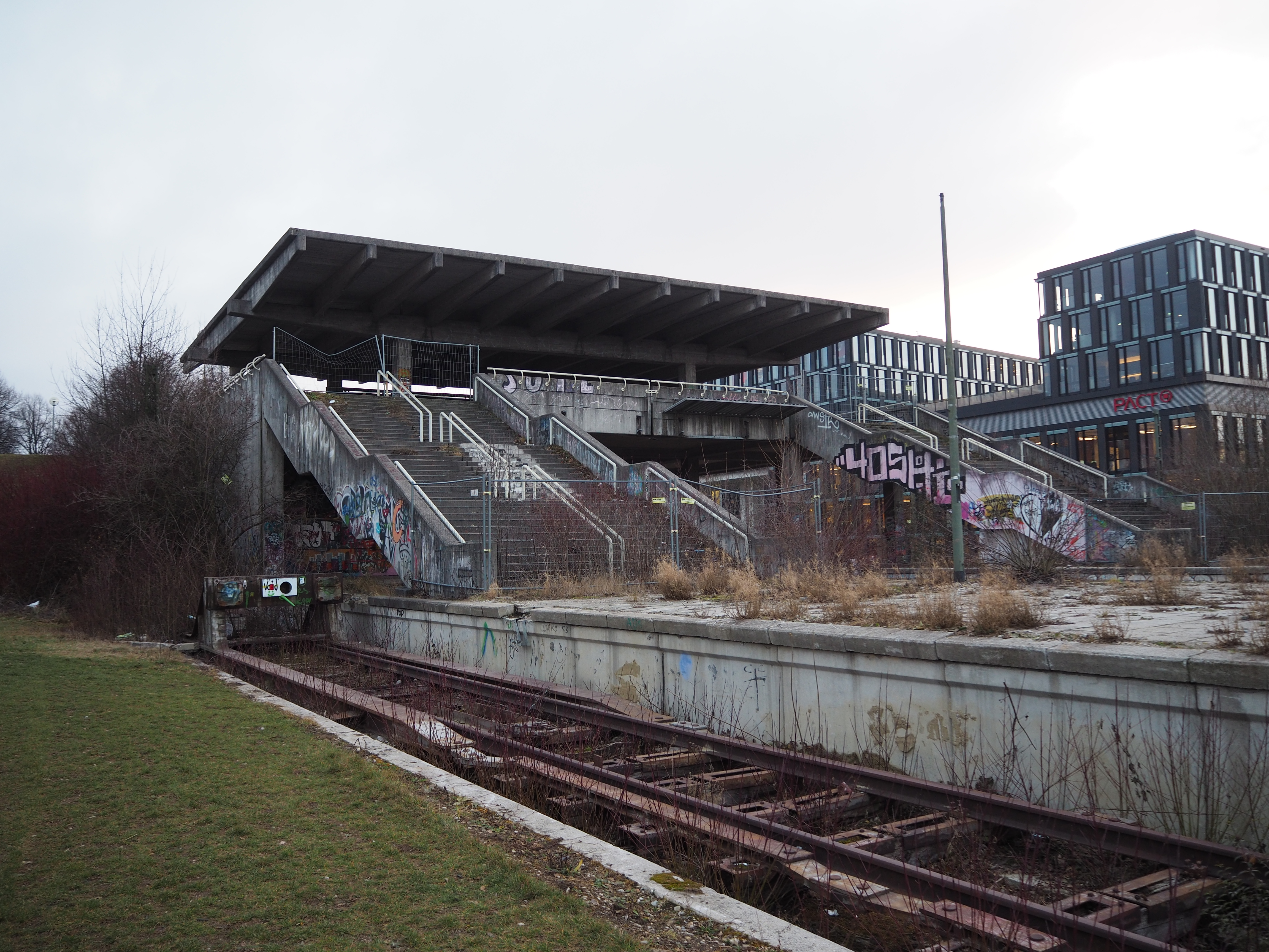 Blick auf das Gebäude, welches als Verbindungsstück zwischen den Bahnsteigen diente